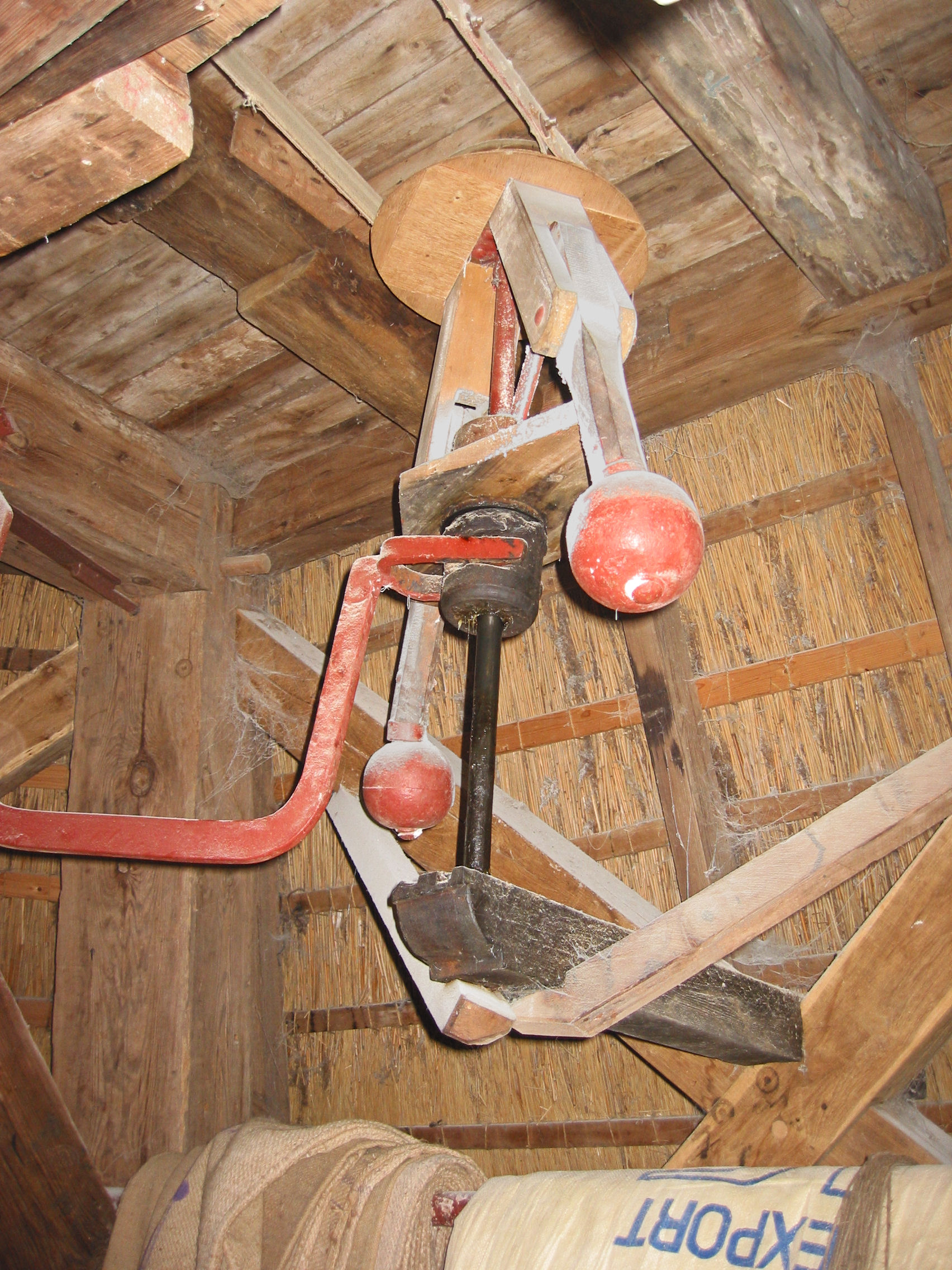 Regulateur Walderveensemolen in Walderveen, Gelderland, the Netherlands